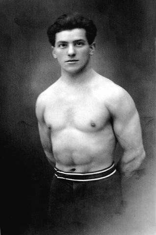 Bedřich Šupčík (1898-1957) - gymnasta a olympijský vítěz